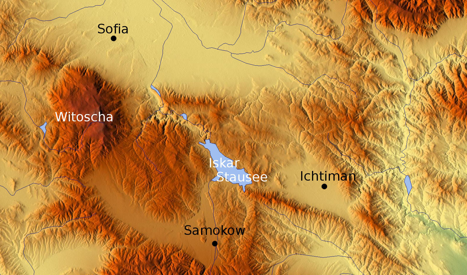 Ichtiman location near Sofia